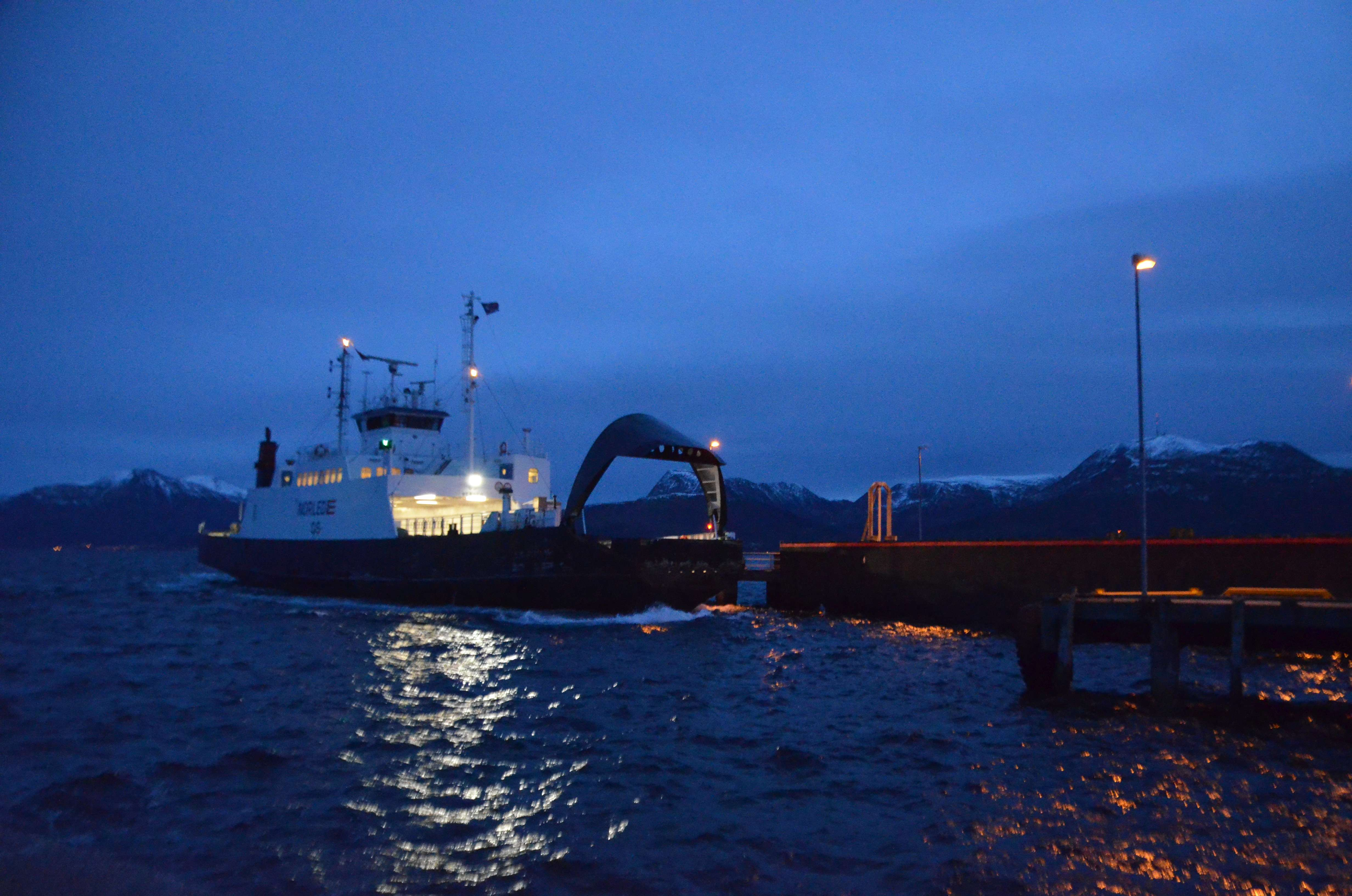 Haram, Norway